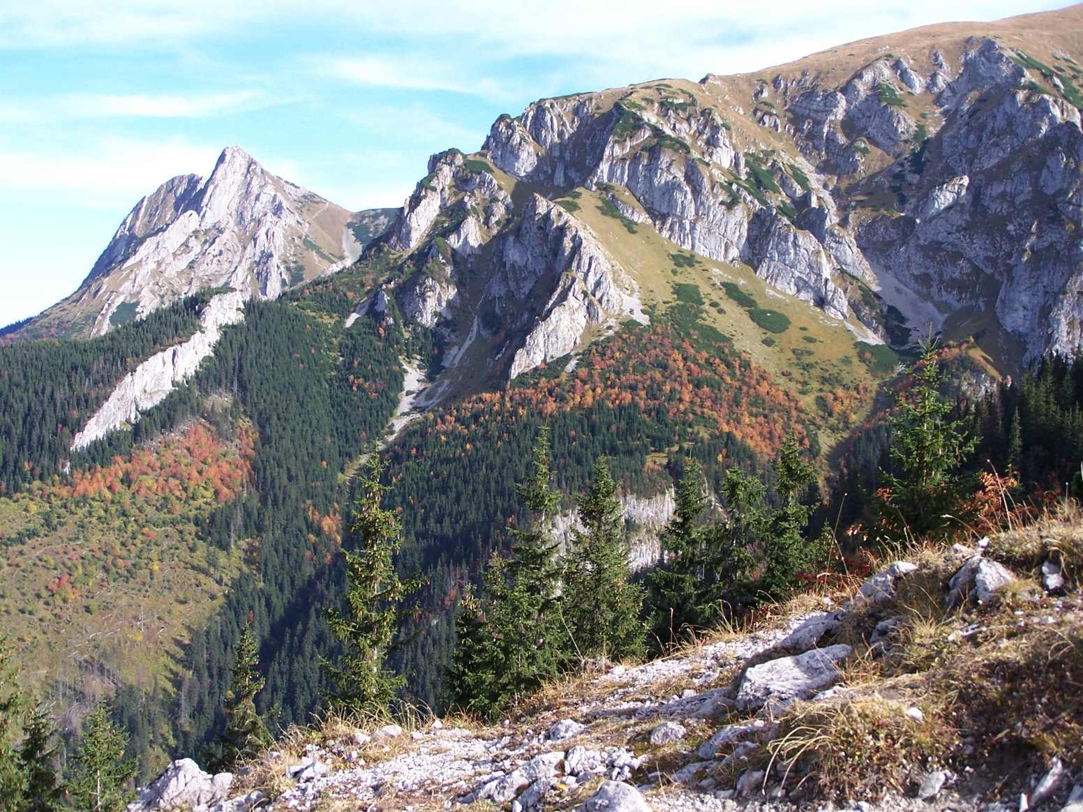 Giewont and Czerwony Grzbiet (Tatra Mountains)